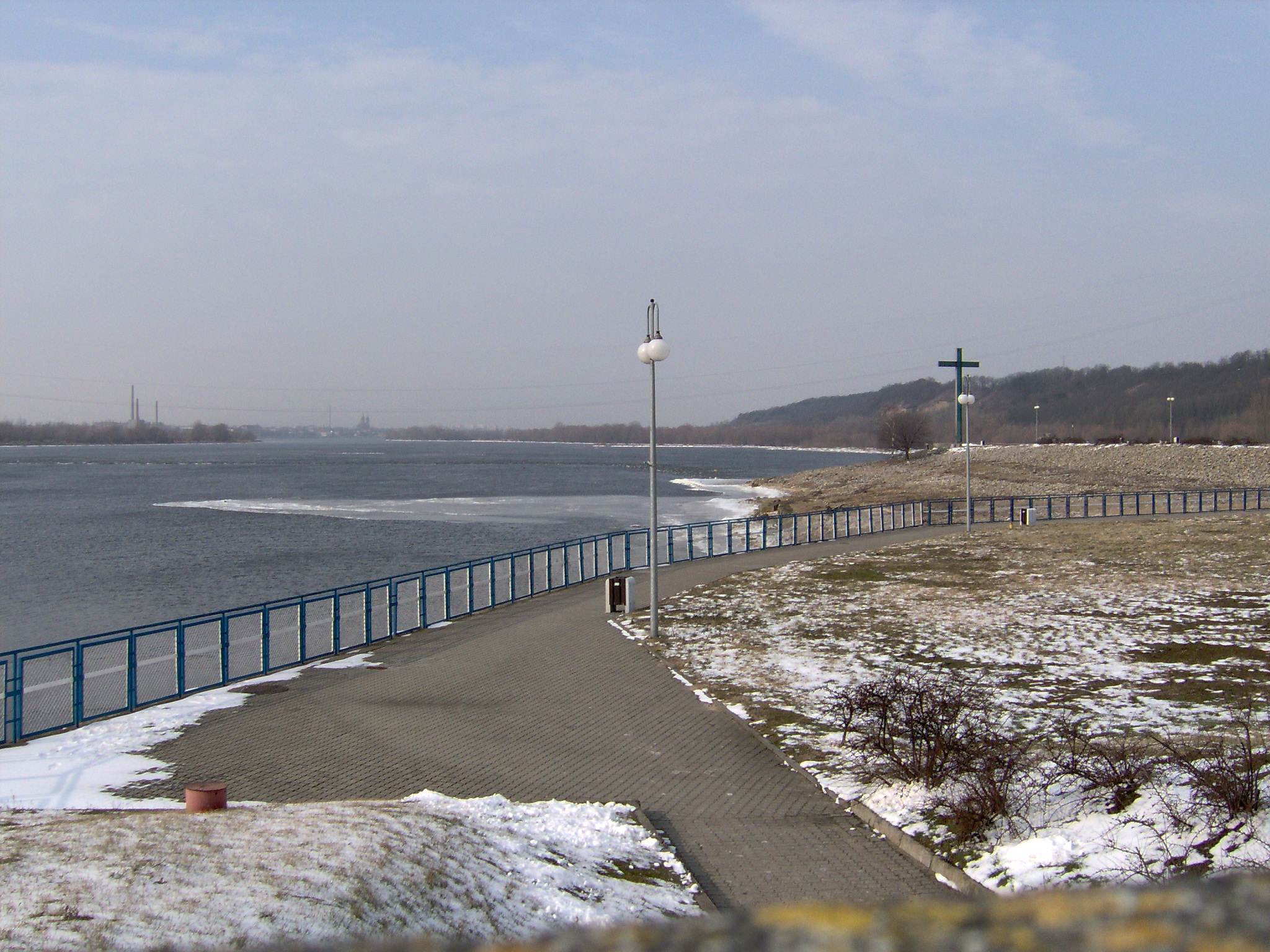 Zapora wodna na Wiśle i okolice (2007 r.)